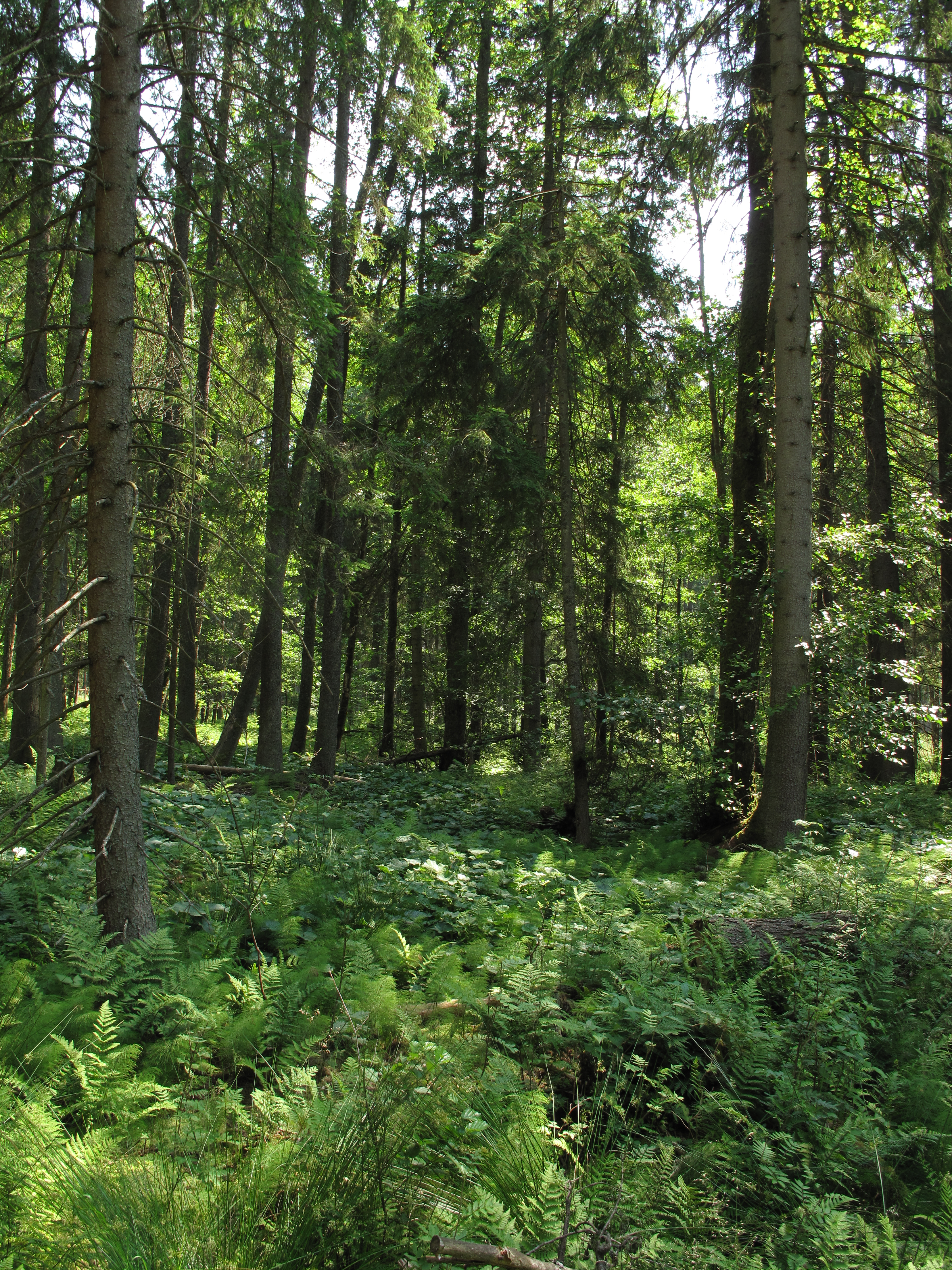 Přírodní památka Olšina v Novolhotském lese. Okres Český Krumlov, Česká republika.